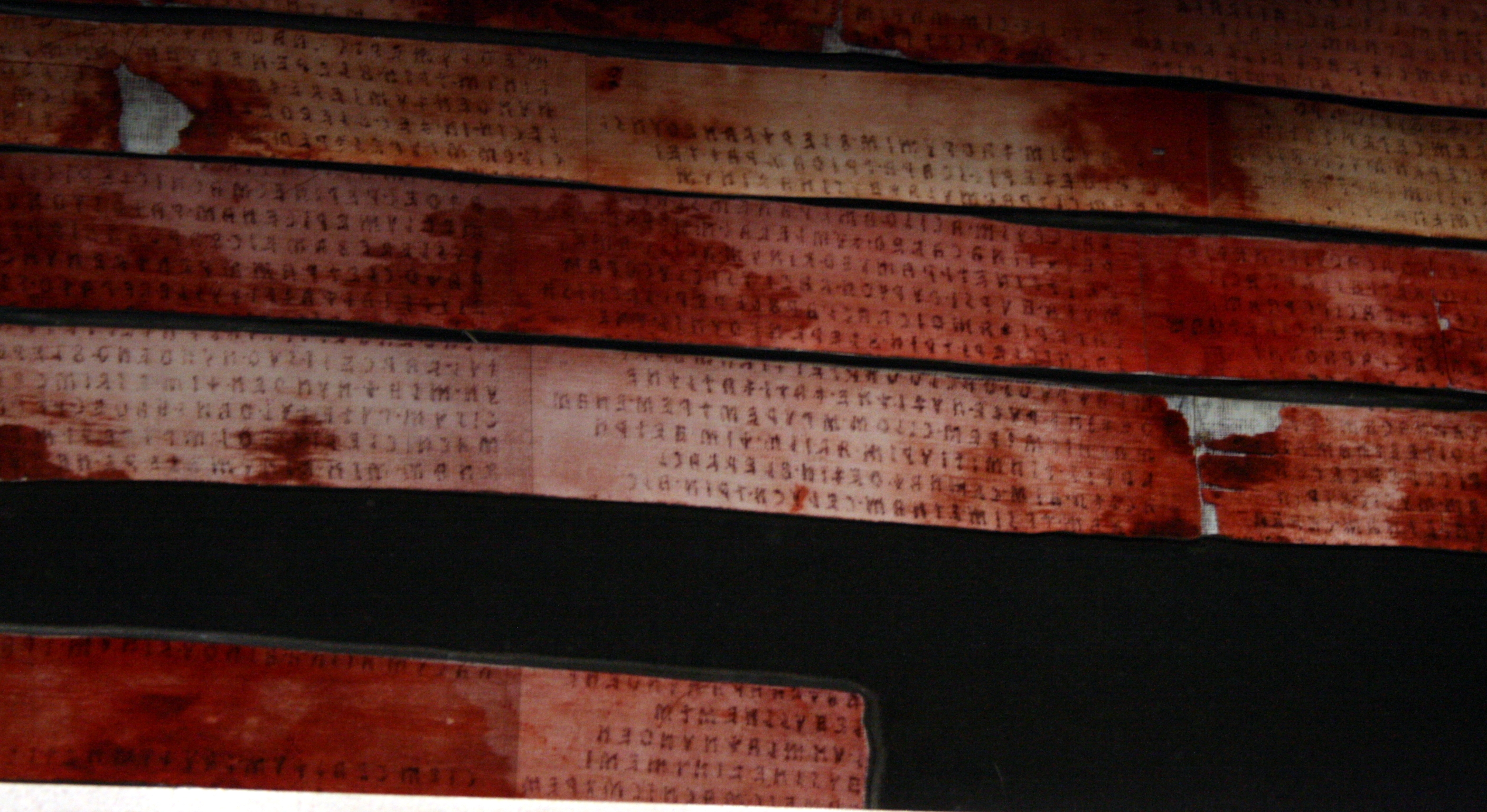 Lanena knjiga (tekst napisan na zavojima zagrebačke mumije)